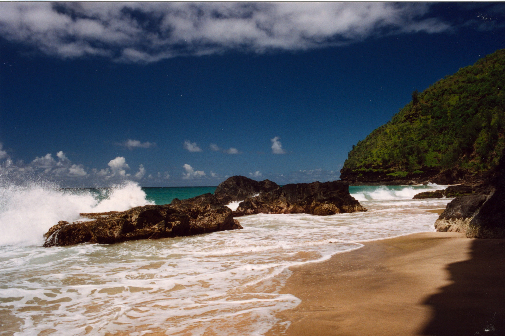 Hanakapiai Beach on the Na Pali Coast in Kauai, Hawaii. Taken August 1995.